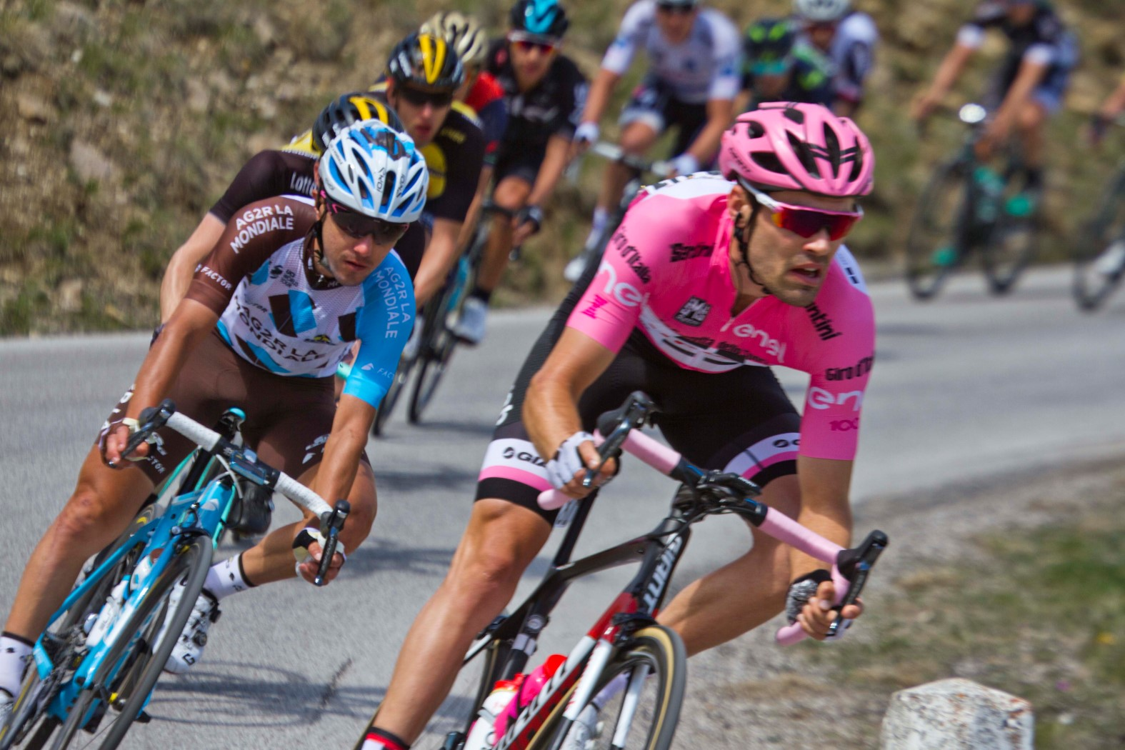 207 dumoulin pozzovivo